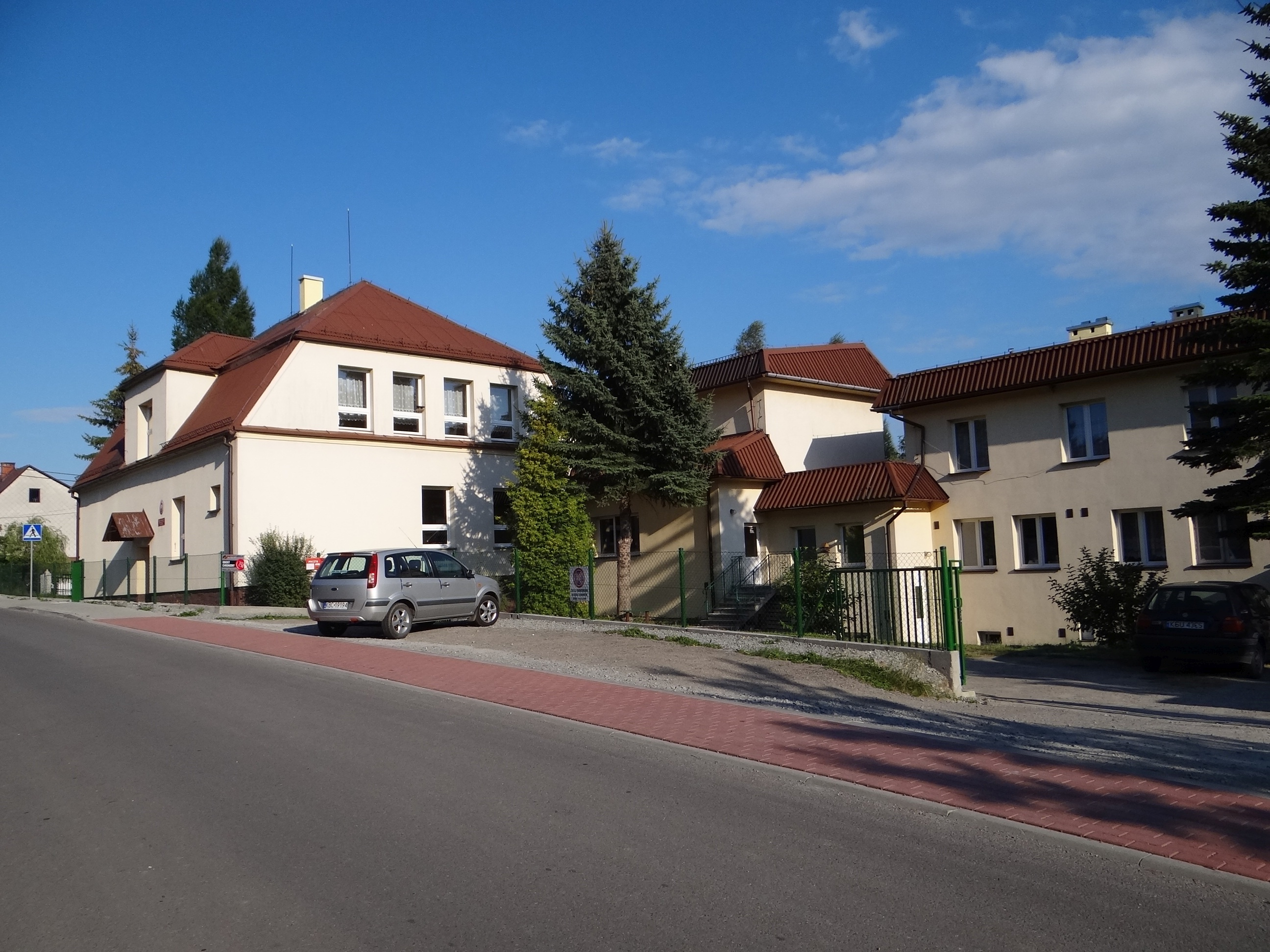 Szkoła w Kukowie